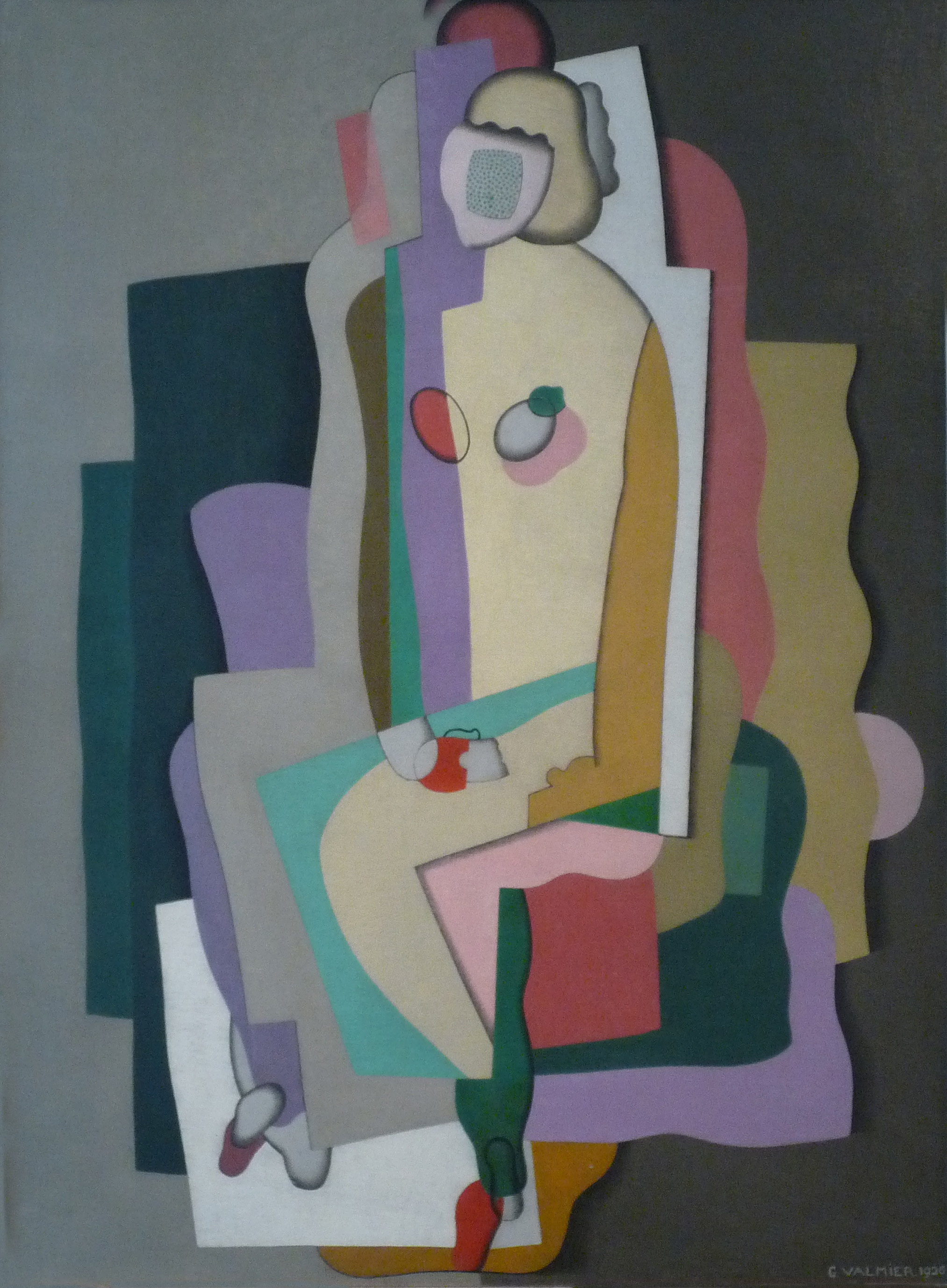 Georges Valmier, Composition, huile sur toile, 1926, Musée des beaux-arts de Nancy